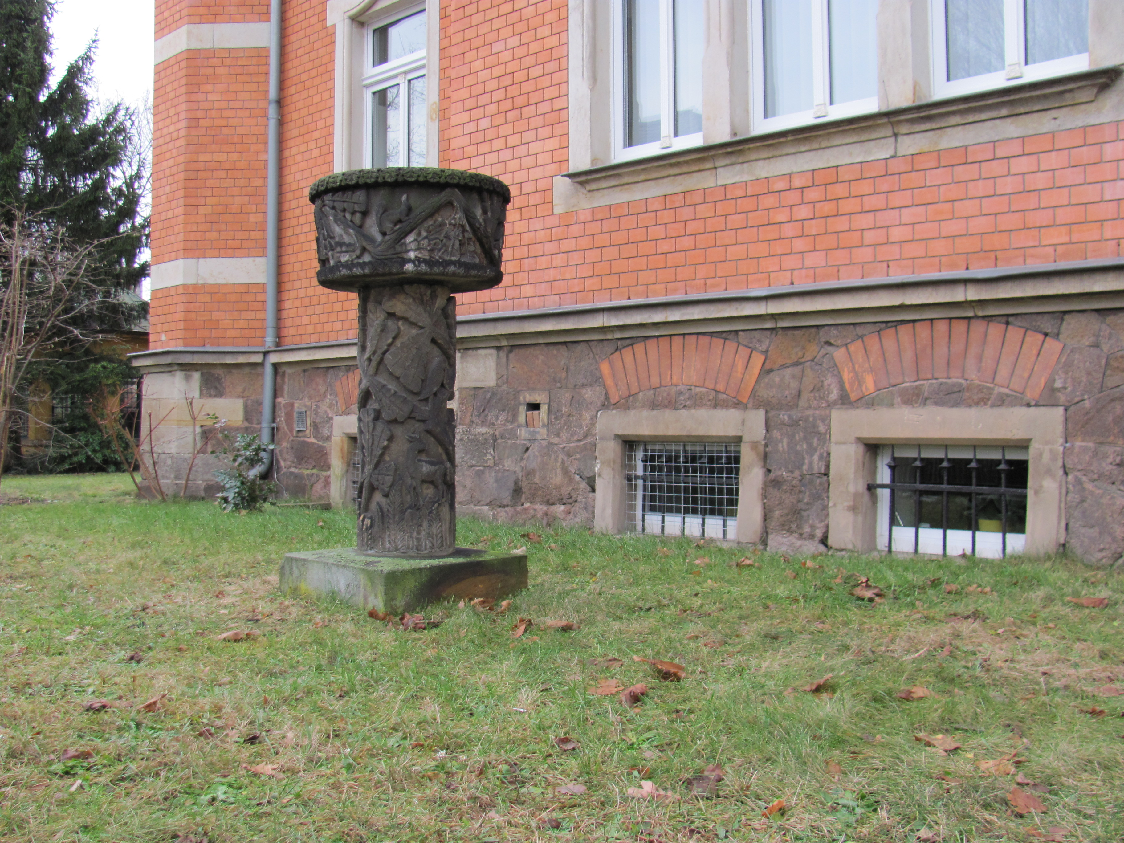 Radebeul-Niederlößnitz, Mietvilla Carl August Böhmer, Wasserschale im Vorgarten